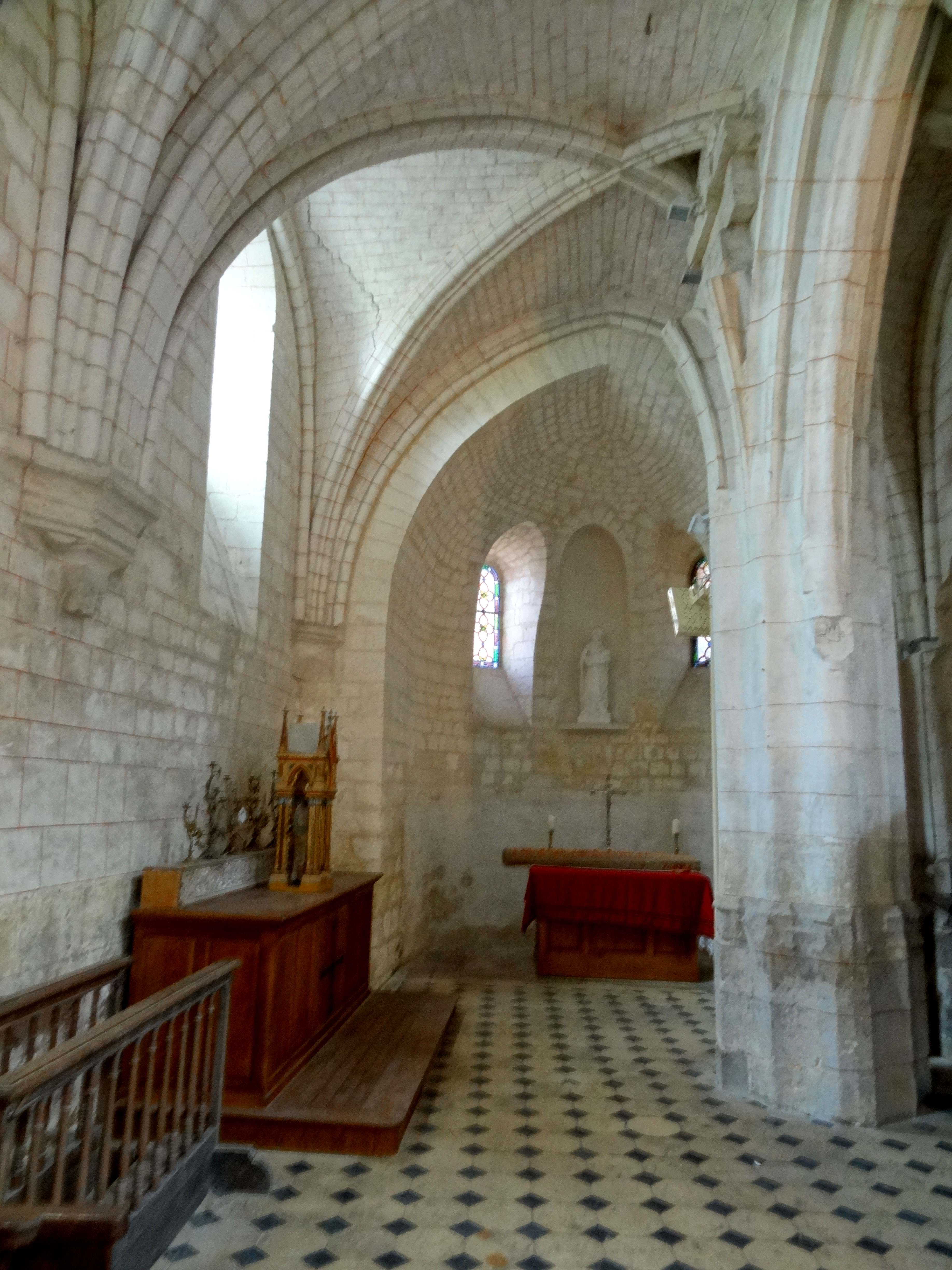 Intérieur de l'église - voir titre.